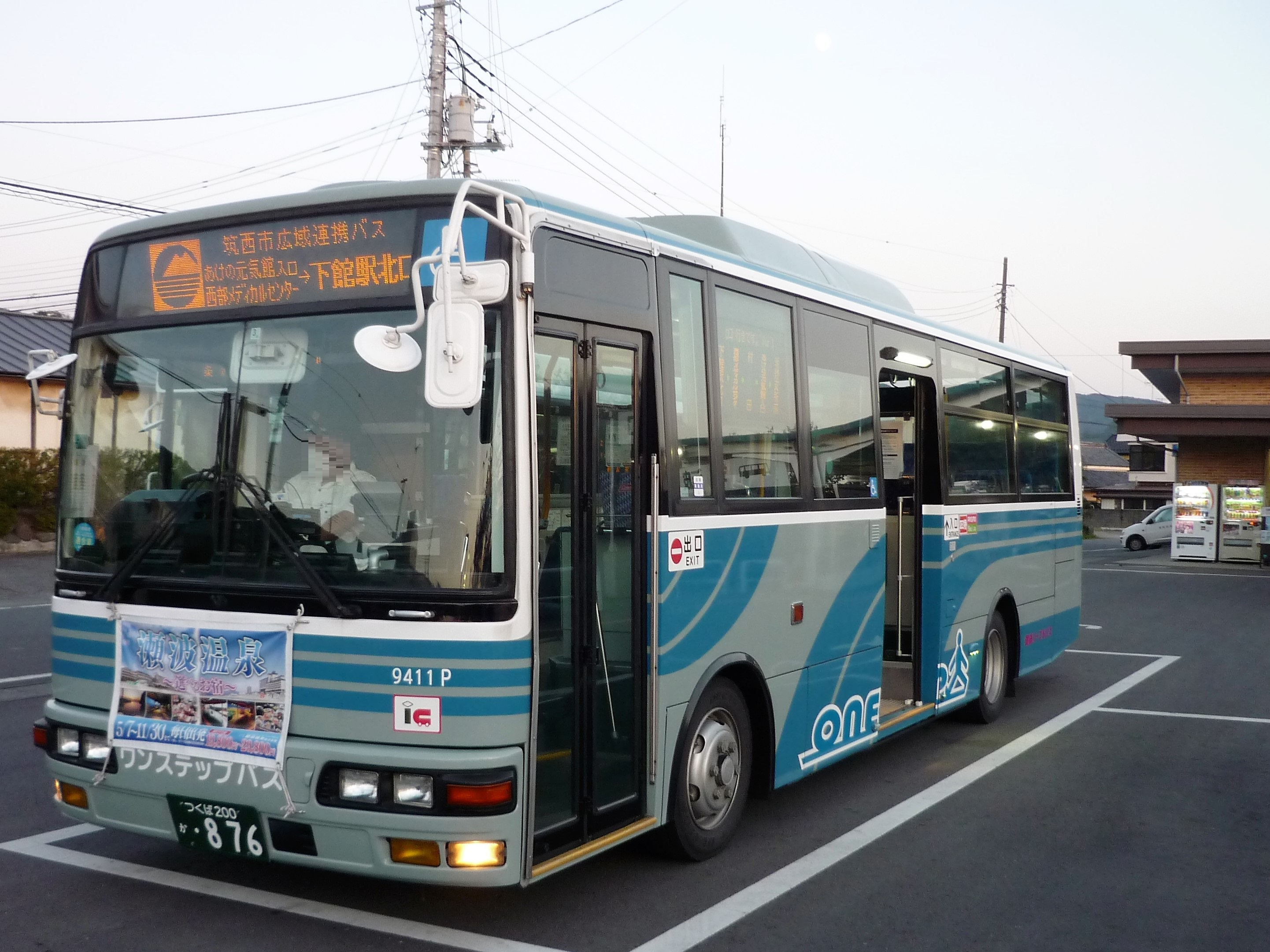 筑波山口バスターミナルに停車中の筑西市広域連携バス Panasonic Lumix DMC-FS3